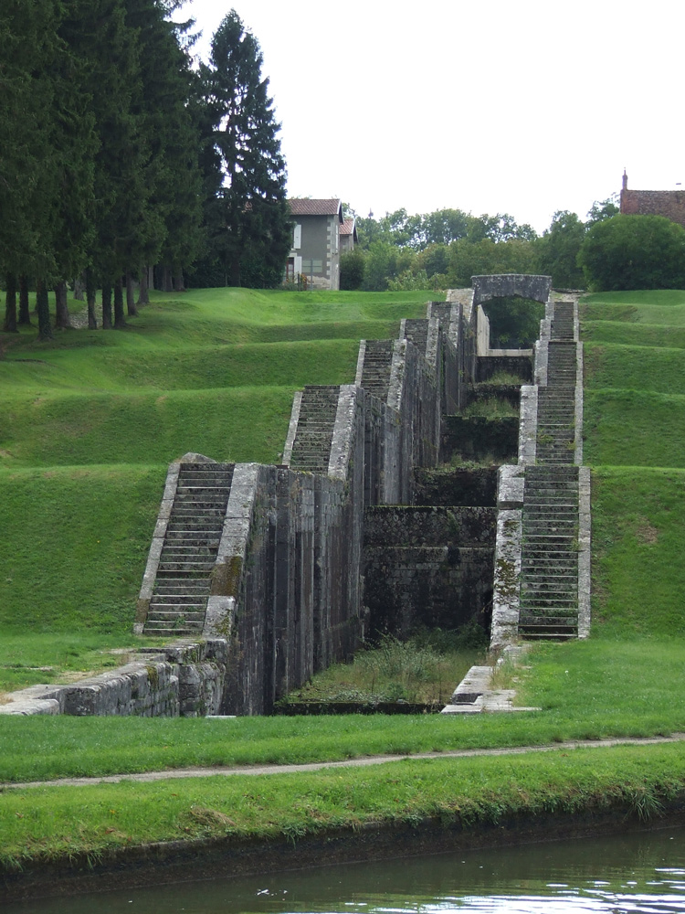 Description du contenu : Echelle de Rogny les 7 écluses sur le canal de BRIARE (FRANCE). Source : œuvre personnelle (own work en anglais). Date de publication : 01/01/2007 Auteur du fichier : Jean CLAIR